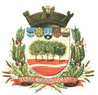 Brasão do Município de Jaboticabal